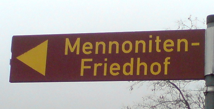 Hinweisschild zum Mennoniten-Friedhof in Limburgerhof-Kohlhof